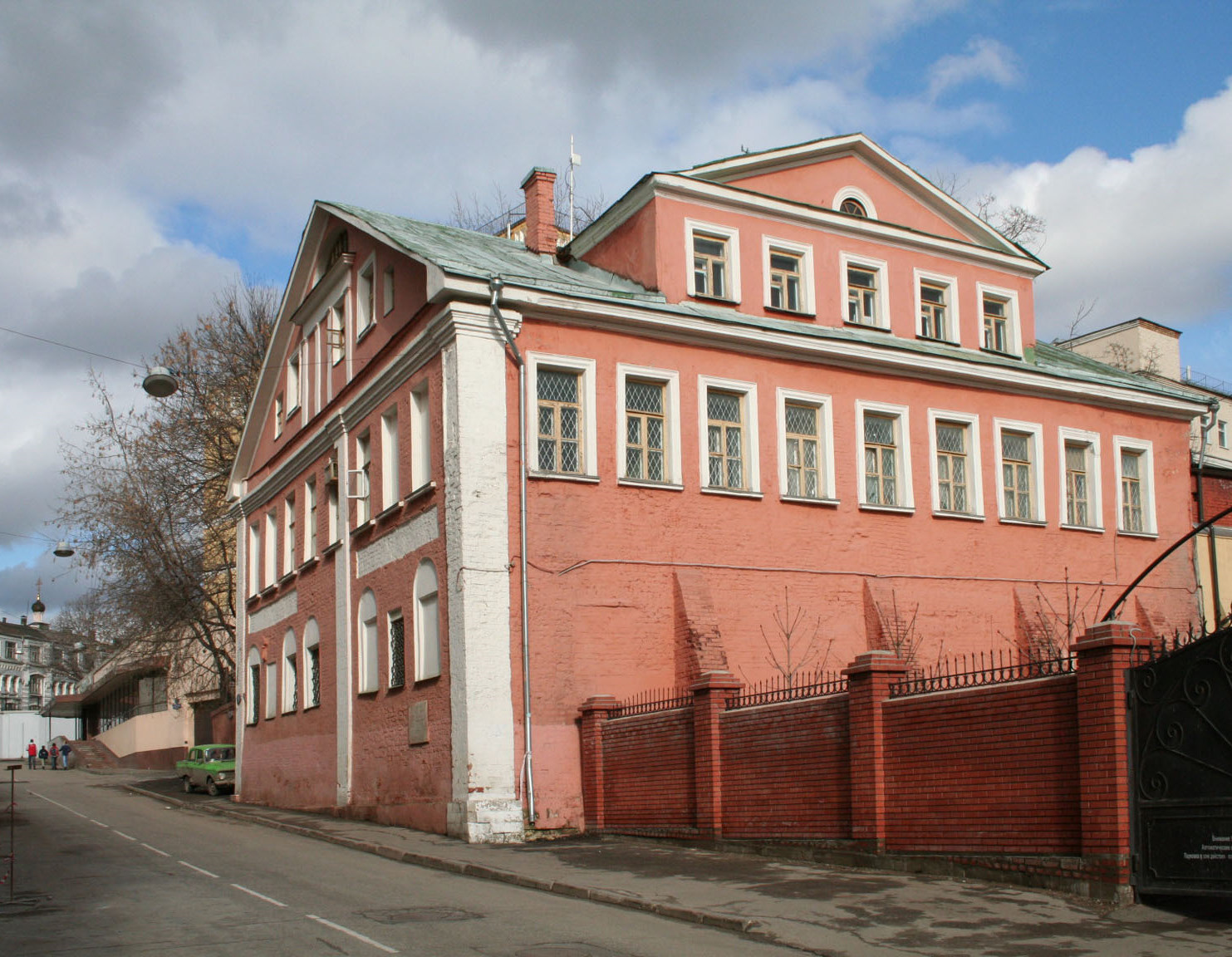 Палаты Шуйских в Подкопаевском переулке в Москве. Участок, где находятся палаты в 16 веке принадлежал Шуйским. Правая часть дома относится к 17 веку, левая же пристроена в 18 веке. Сохранились своды и восстановлены наличники 17 века, оказавшиеся после перестройки дома внутри помещения.